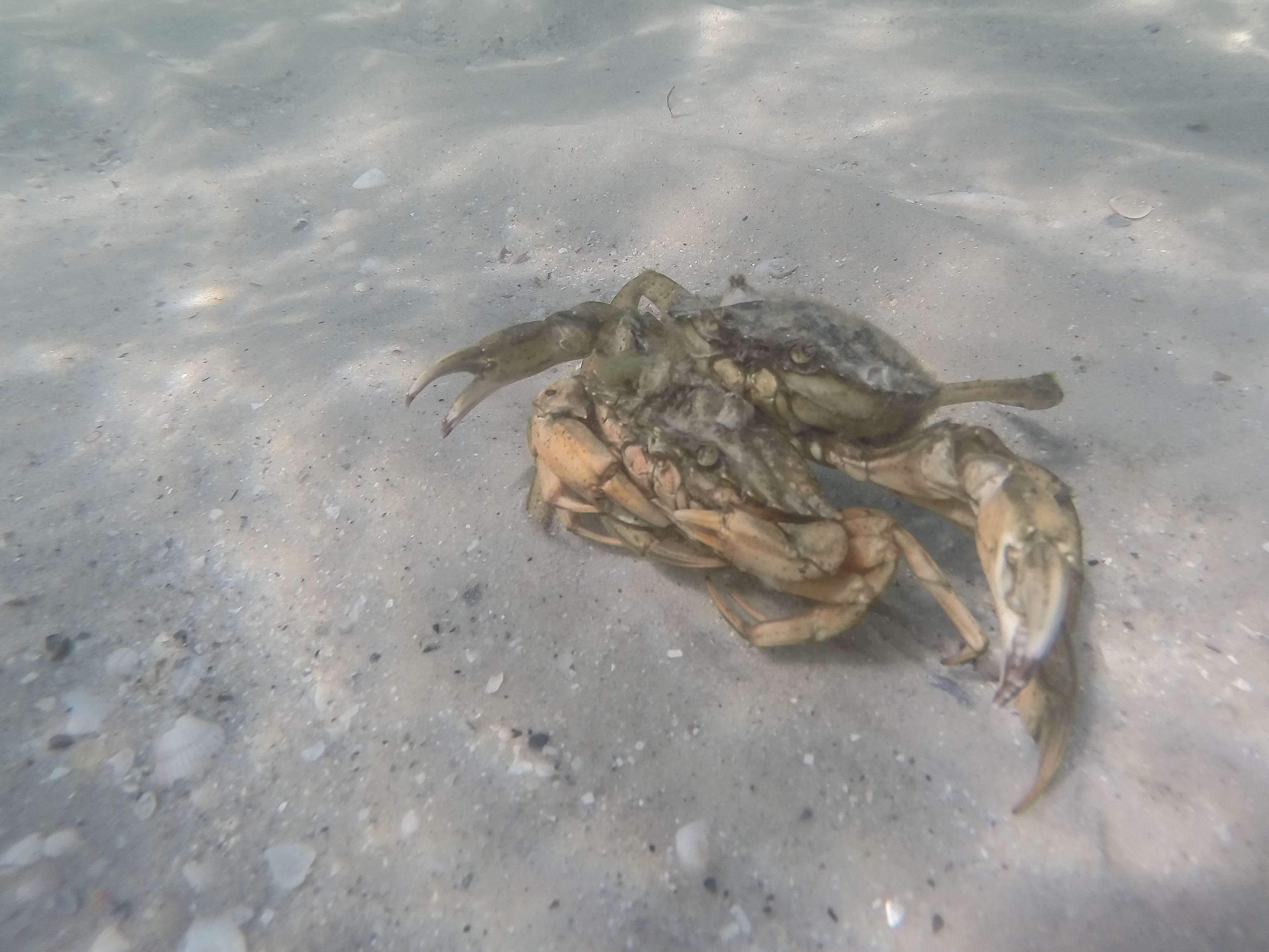 Знято під час експедиції на о. Джарилгач This photo/video of Dzharylhach was taken during Wikiexpedition to Dzharylhach supported by Wikimedia Ukraine. You can see all photographs in category Category:Wikiexpedition to Dzharylhach. English | українська | +/−